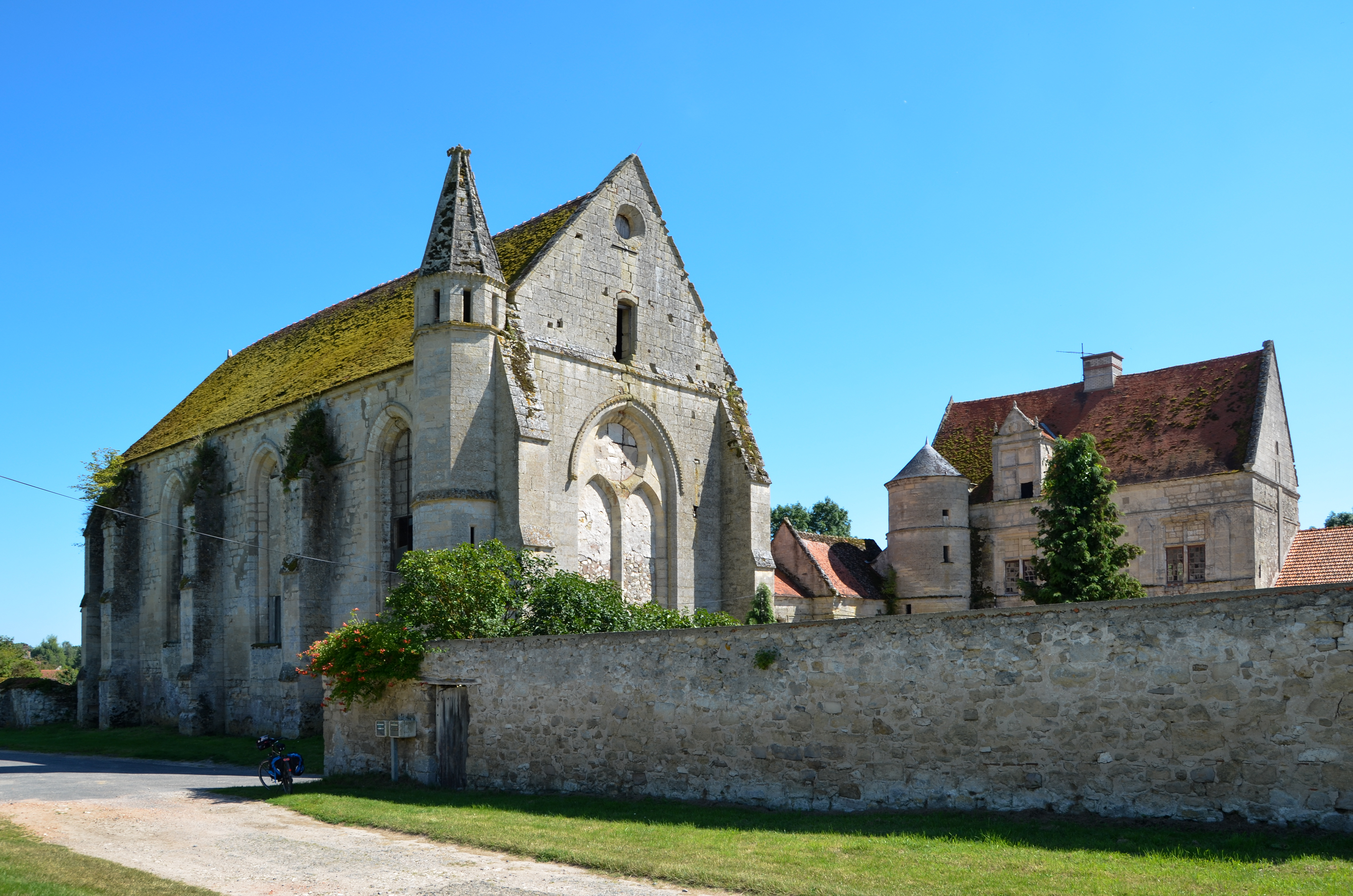 Commanderie des templiers de Moisy à Montigny-l'Allier, Aisne, Picardie, France. Construction : 13e siècle; 16e siècle.